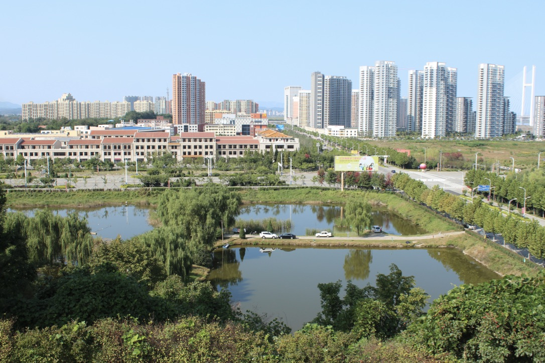 中文（中国大陆）: 从灯塔山公园眺望丹东新区